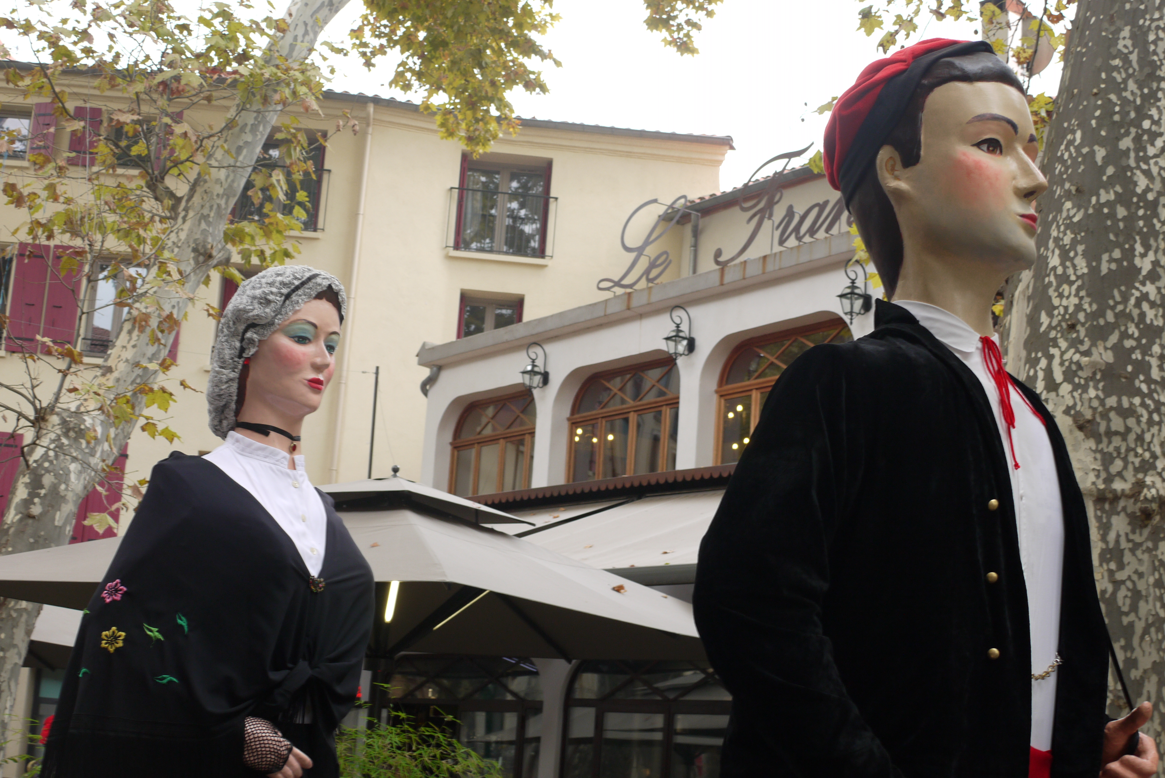 Gégants de Thuir à Céret